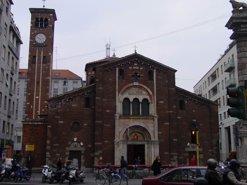 Facciata della chiesa di S. Babila a Milano